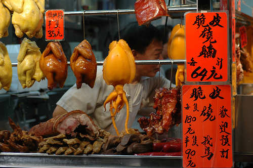 Cantonese siu laap